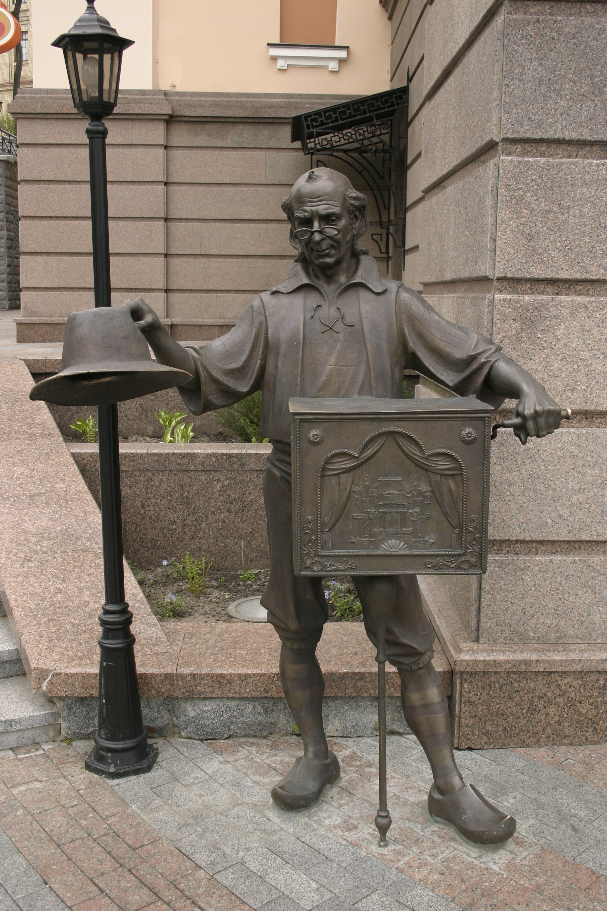 г.Киев "Театр кукол" Папа Карло